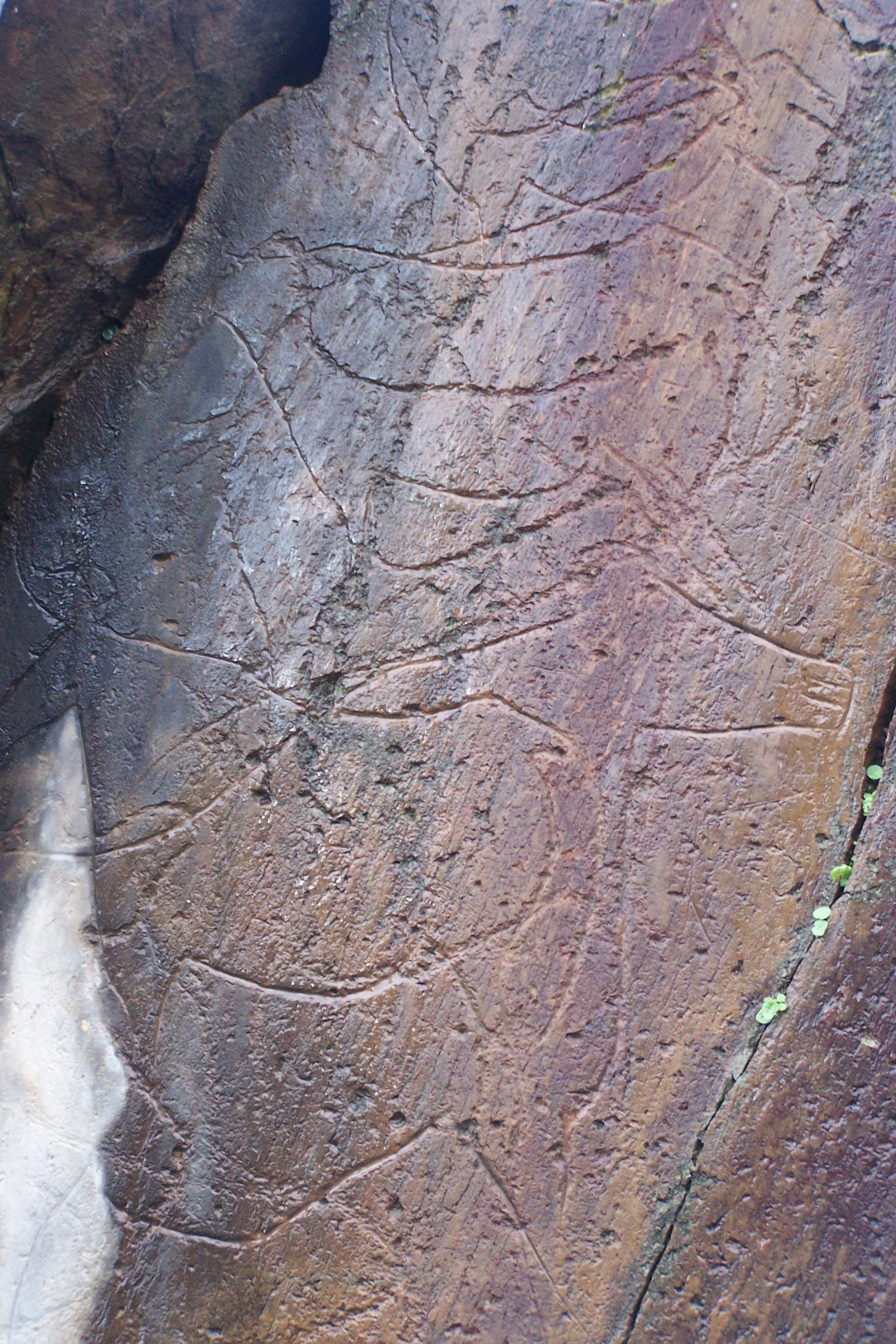 Sítio arqueológicos no Vale do Rio Côa - Núcleo de arte rupestre da Penascosa.